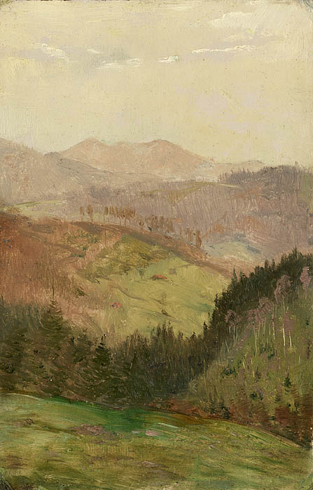 Gebirgsstudie; Öl auf Malpappe, rückseitig beschriftet: “Aus dem Nachlaß von Albert Singer / Schliersee”; 27 × 17,5 cm